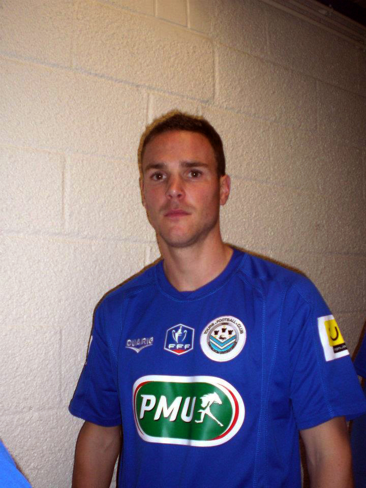 Romain Sartre avant le début du match Avion / Tours - septième tour de la Coupe de France de Football à Avion le 19 novembre 2011